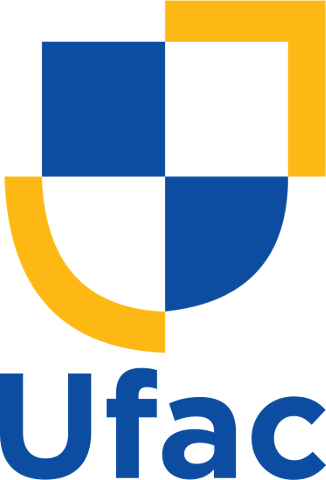 Logotipo da Universidade Federal do Acre.